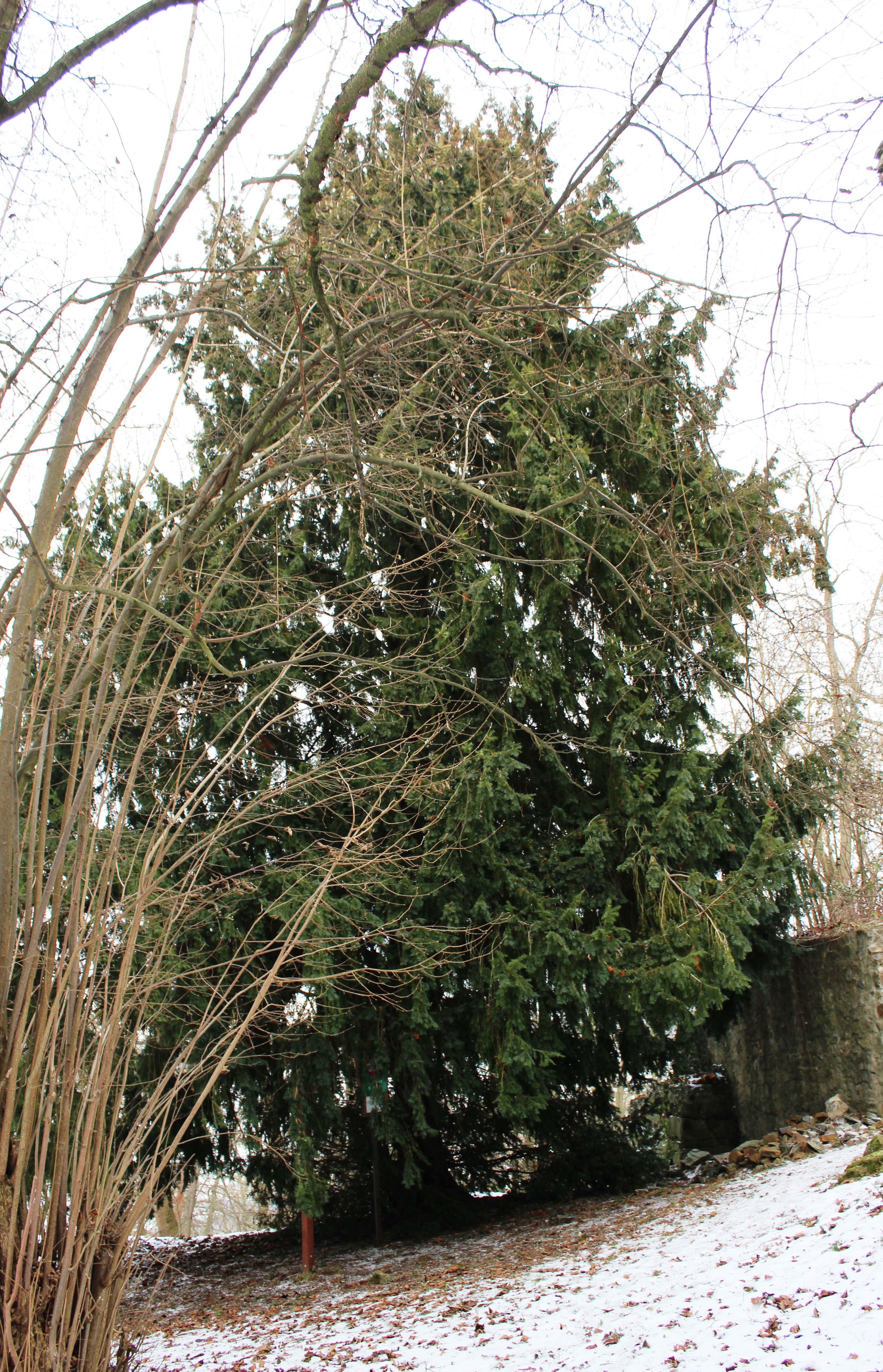 Památný Roupovský tis na hradě. Roupov (hrad)-(okres Plzeň-jih). Česká republika.